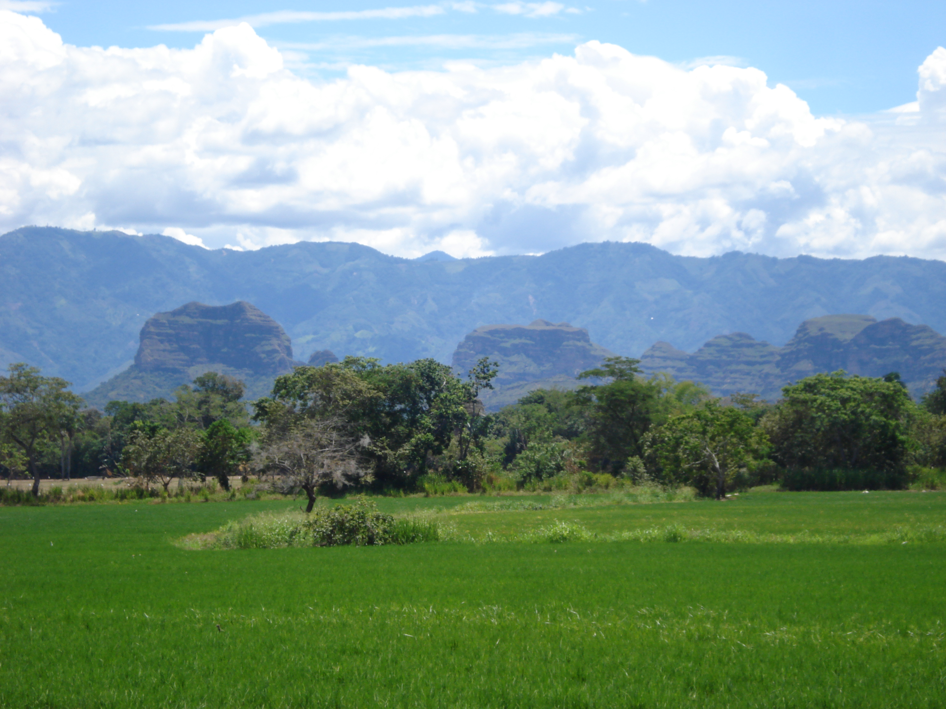 Cerros los Abichuchos Ortega Tolima Colombia